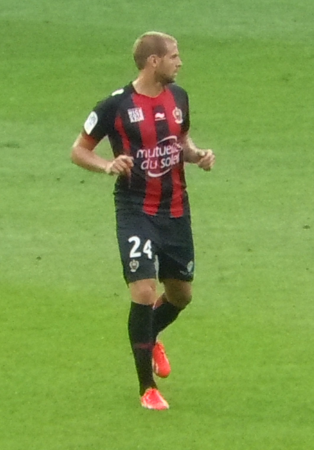 Mathieu Bodmer sous les couleurs de l'OGCN